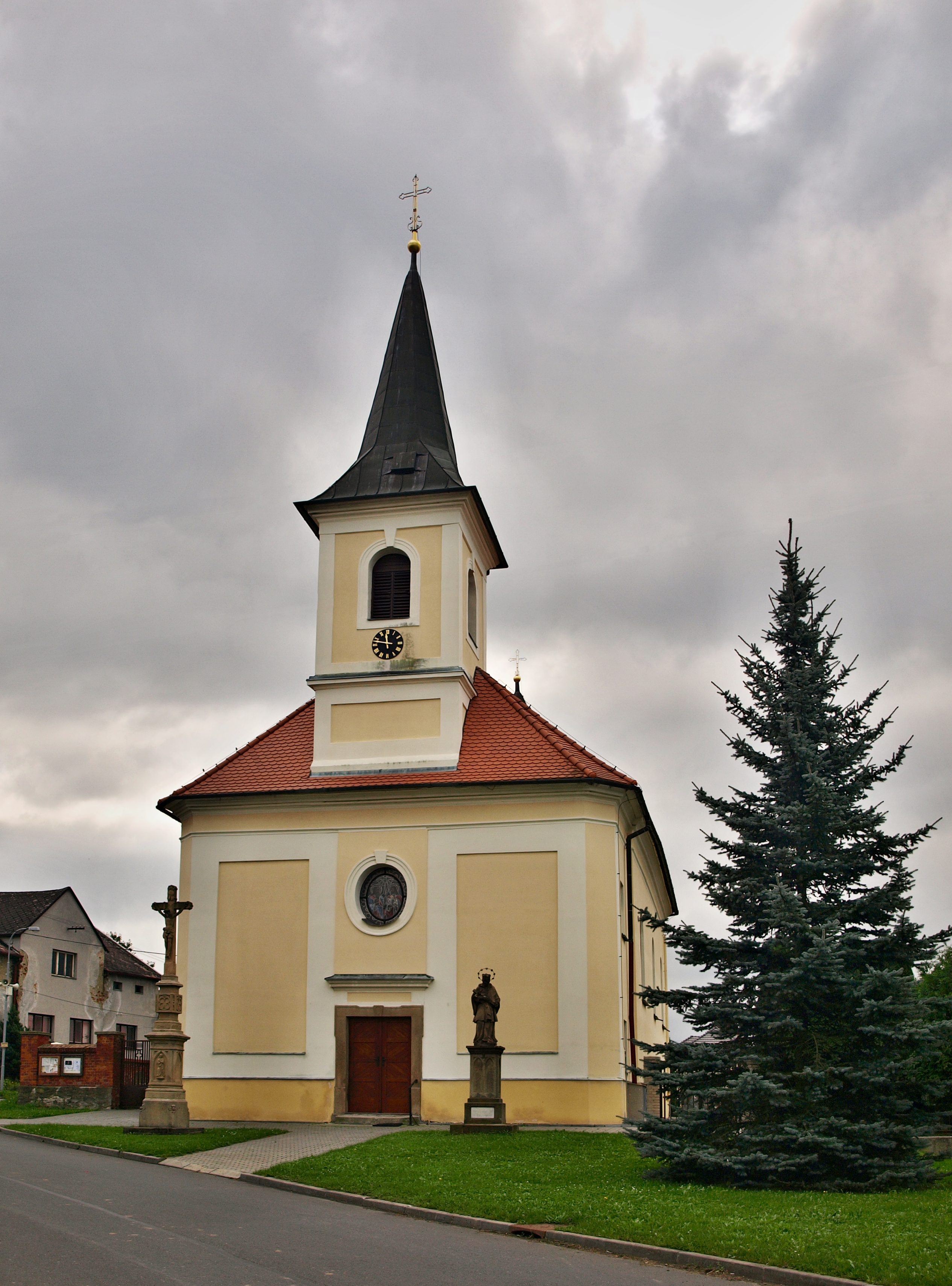 Kostel svatého Kříže, Blazice.